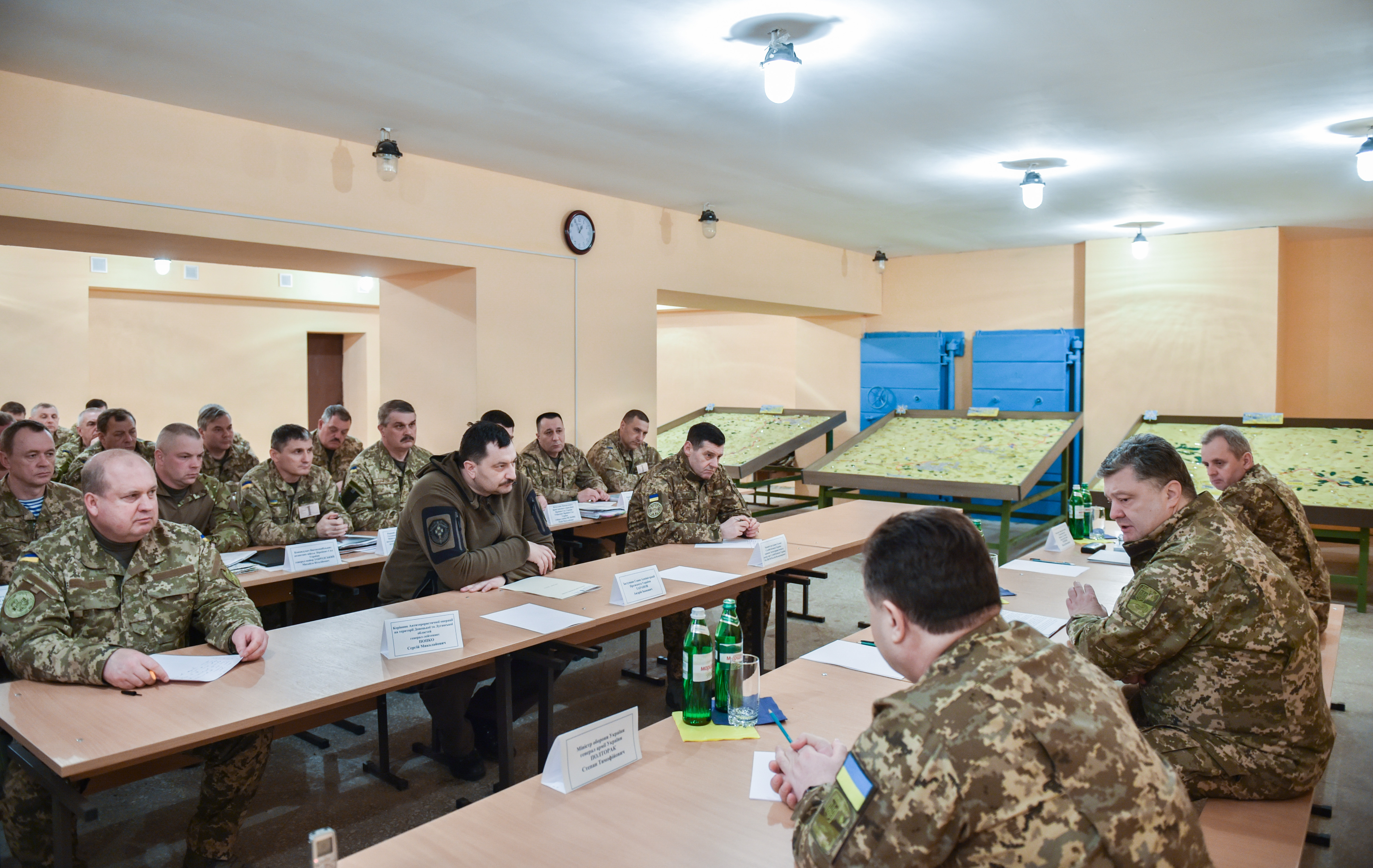 Рабочая поездка Порошенко в Донецкую область